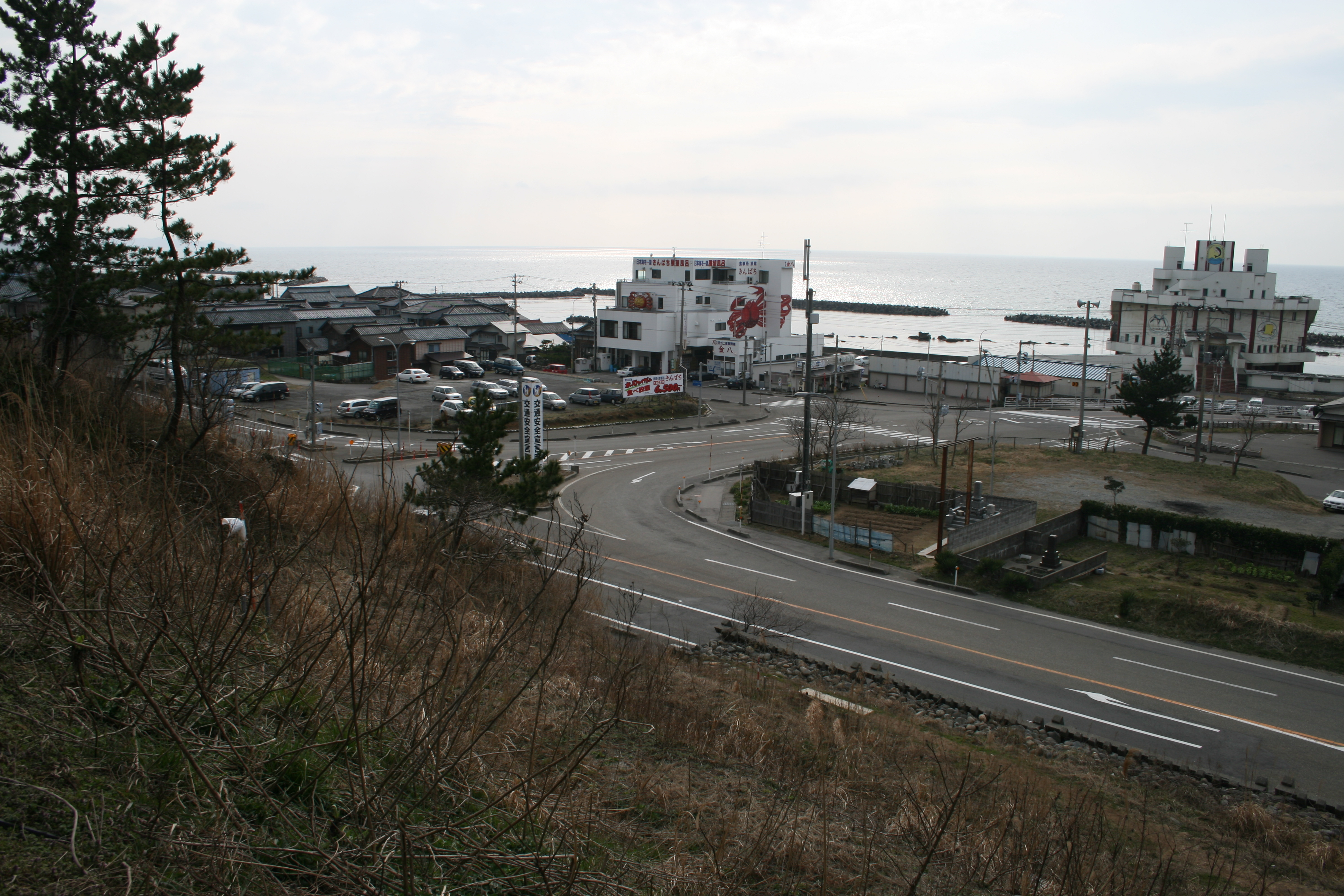 長岡鉄道寺泊駅跡。左の駐車場から右の集会場にかけての一帯が駅跡。